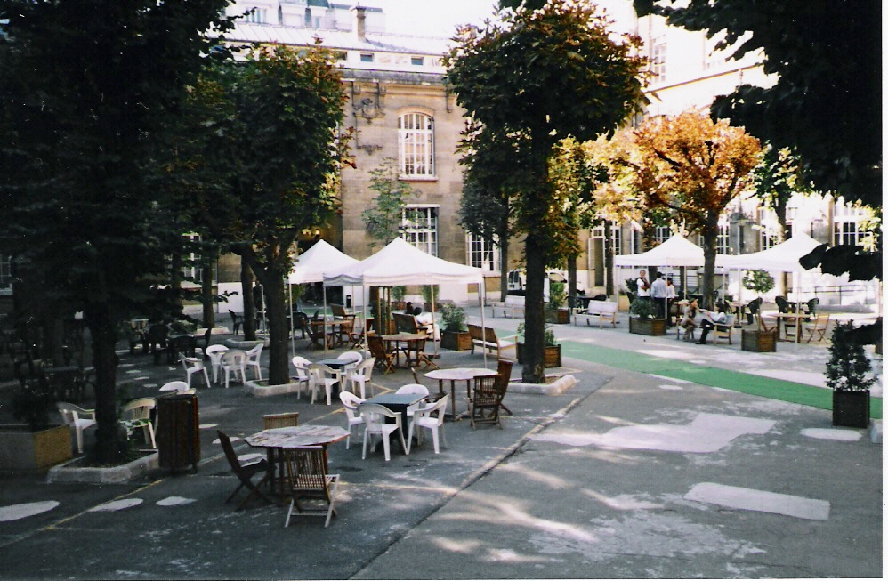 ESCP-EAP European School of Management, 79 Avenue de la République, 75011 Paris, vue de la cour intérieure. Own Work 6/4/2007 Author : R-Hudit